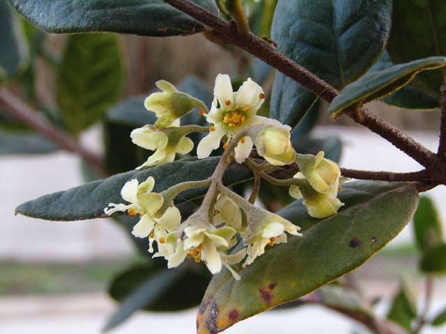 Flores masculinas de Boldo. Foto capturada en septiembre 2018. Talca.